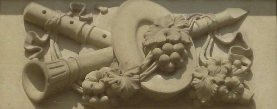 Kämpferrelief 4 (Zählung von links nach rechts), Stuttgart, Villa Berg, Südfassade.